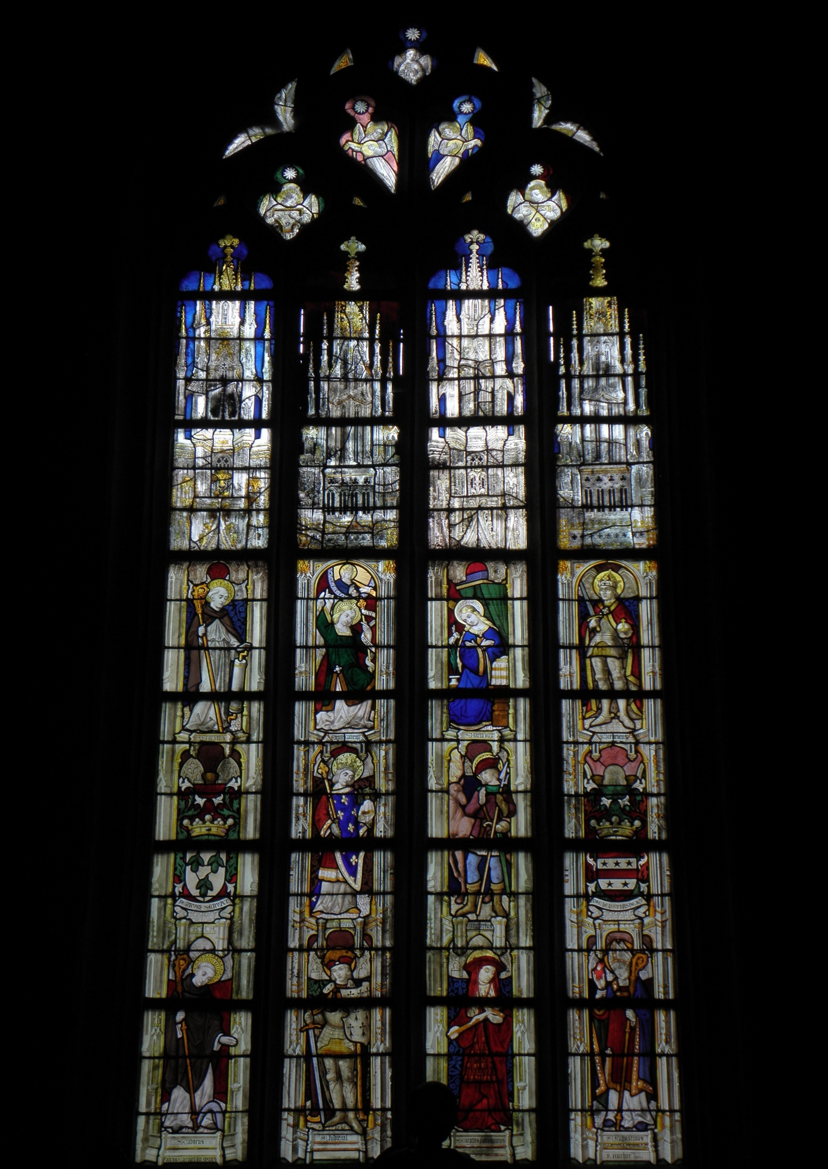 Baie 08 de la basilique Notre-Dame-du-Roncier de Josselin (56). Datation: v.1470-1480 et v.1890-1895. Maître-verrier: atelier Hucher et Carmel du Mans. Description:1er registre: Saint-Cado, Saint-Judicaël, Saint-Charles Borromée et Saint-Augustin; 2ème registre: Saint-Louis et Saint-Hubert entre deux armoiries; 3ème registre: Saint-Ernest, Annonciation et Saint-Henri; Tympan: anges musiciens.